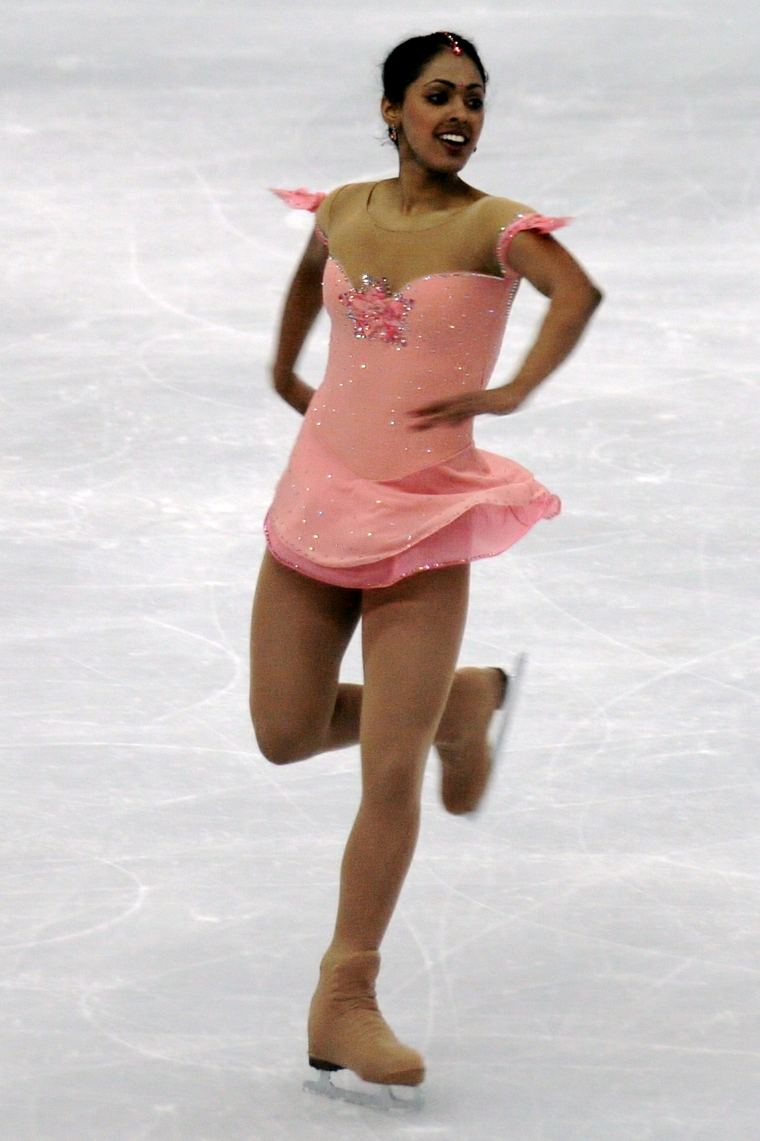 Ами Парех на чемпионате мира по фигурному катанию 2012